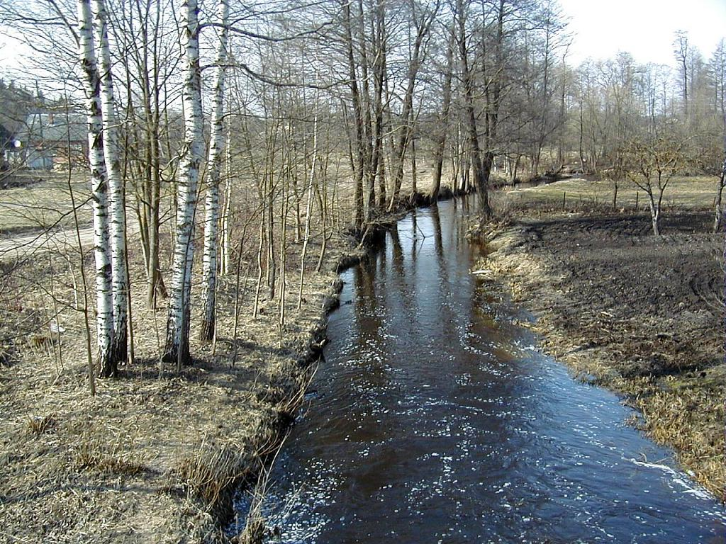 Feimanka River near Riebiņi